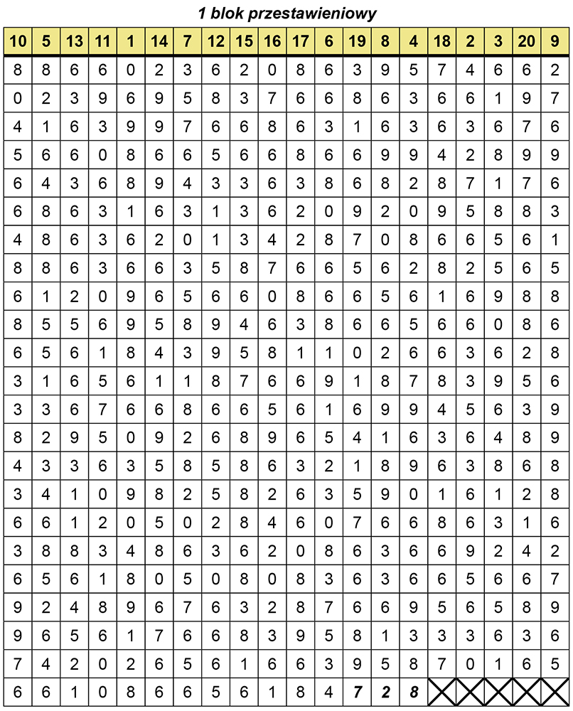 Szyfrowanie szyfrem VIC – pierwszy blok przestawień